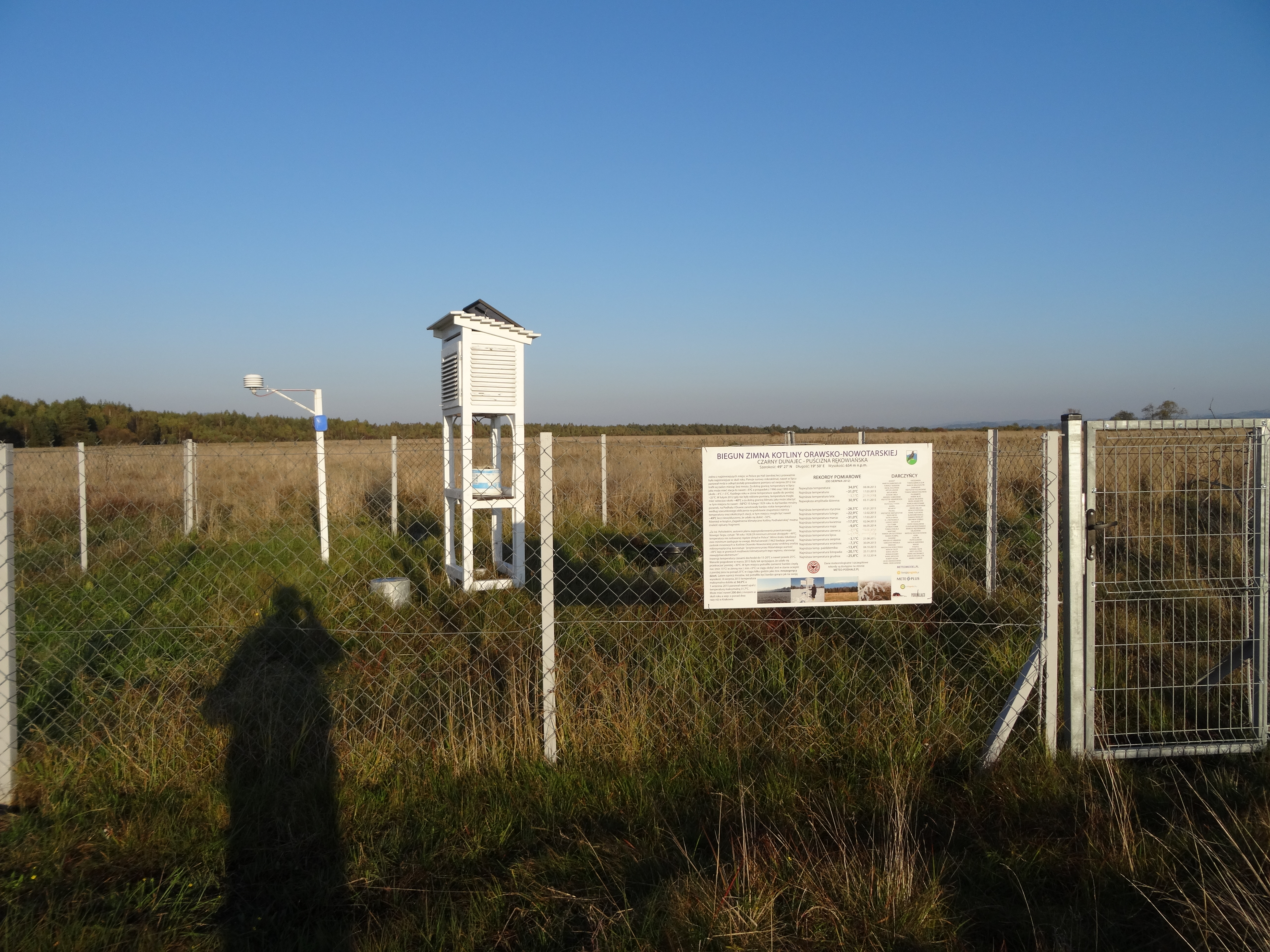 Prywatna stacja meteorologiczna na Puściźnie Rękowiańskiej na terenie administracyjnym Czarnego Dunajca